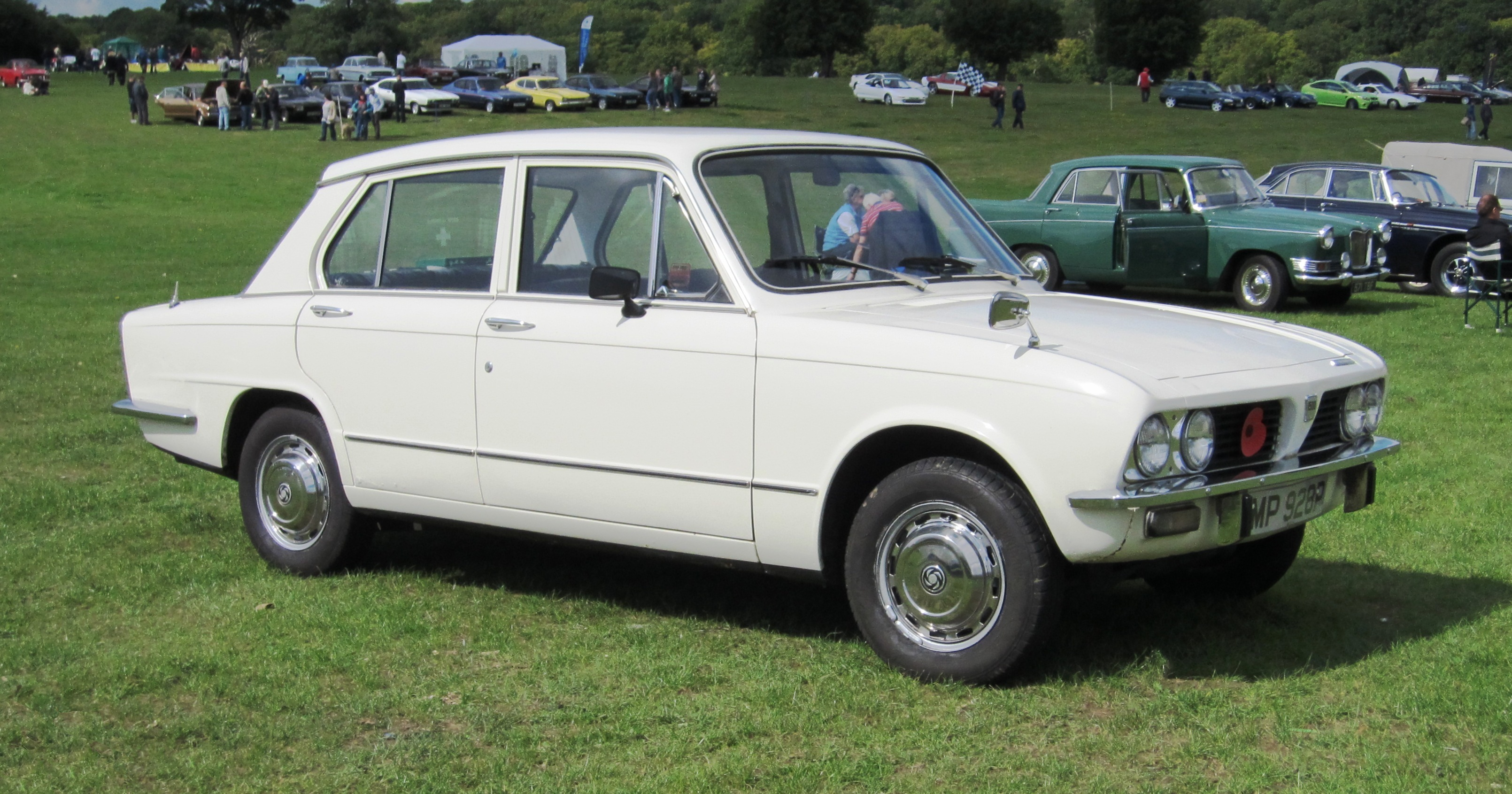 Triumph 1500 TC The Triumph 1500, like the Triumph 1300 which it replaced, was introduced as front wheel drive car. By the time the Triumph 1500TC (this car) was produced, however, drive had switched to the rear wheels which the manufacturer's cost accountants deemed cheaper.